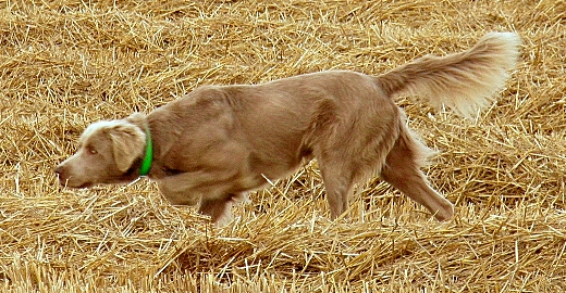 Weimar Poils Longs marquant l'arret